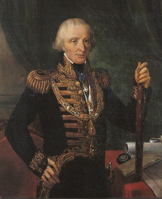 Ignazio Thaon di Revel (Nizza 1760-Torino 1835), ambasciatore, viceré del Regno di Sardegna